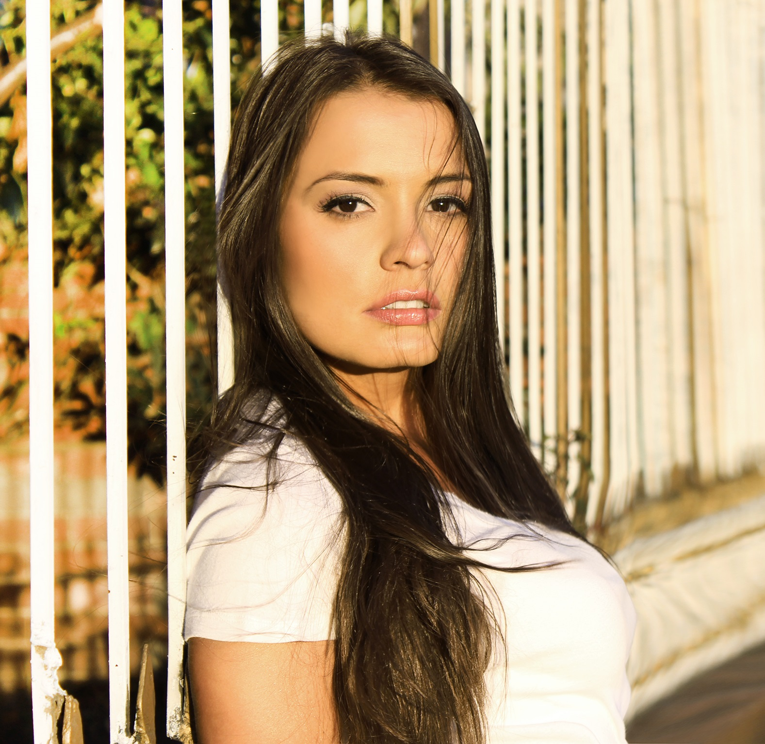 Bebsabe Duque Pacheco